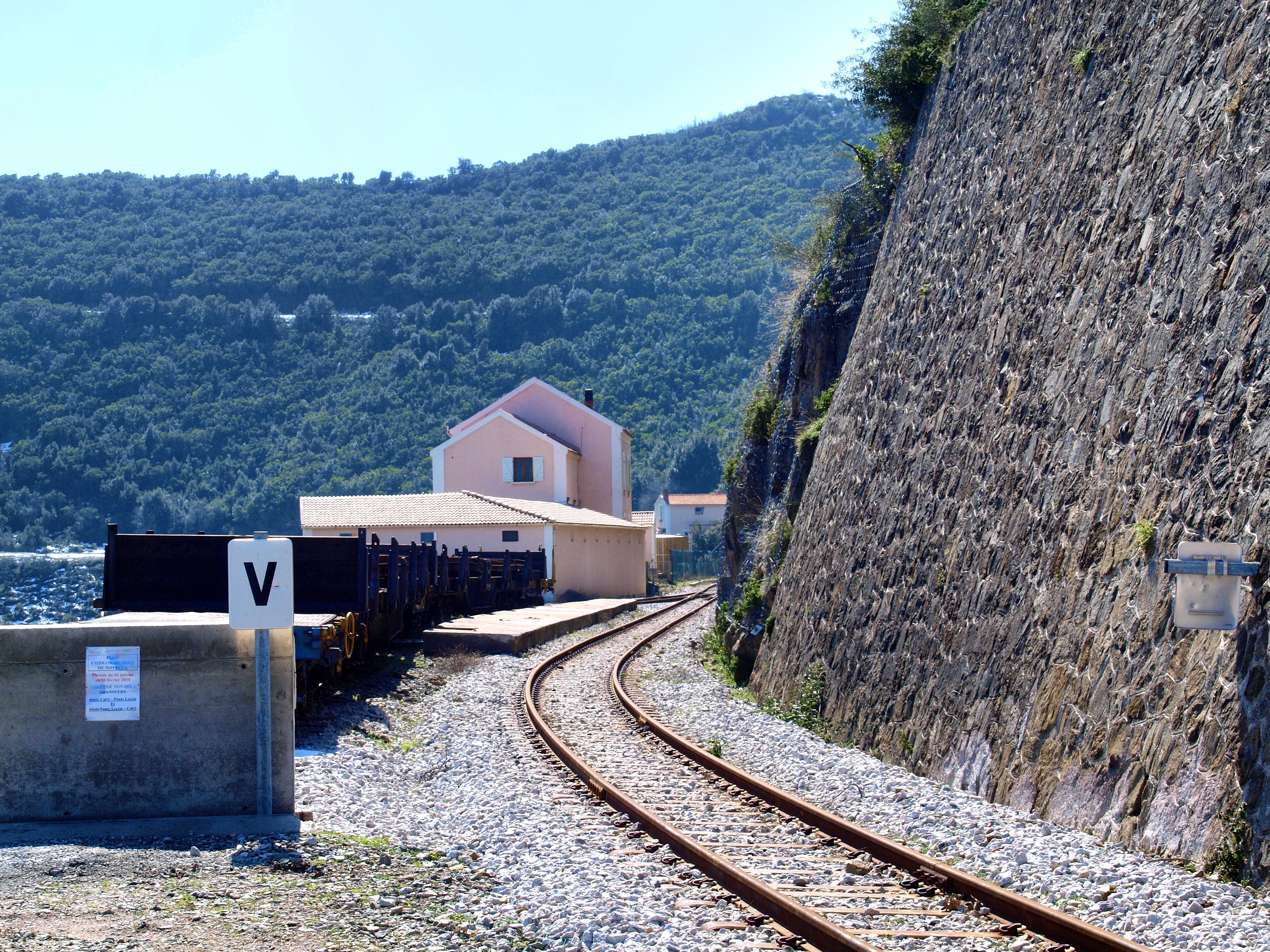 Novella, Paesi d'Ostriconi (Corse) - Gare de Novella